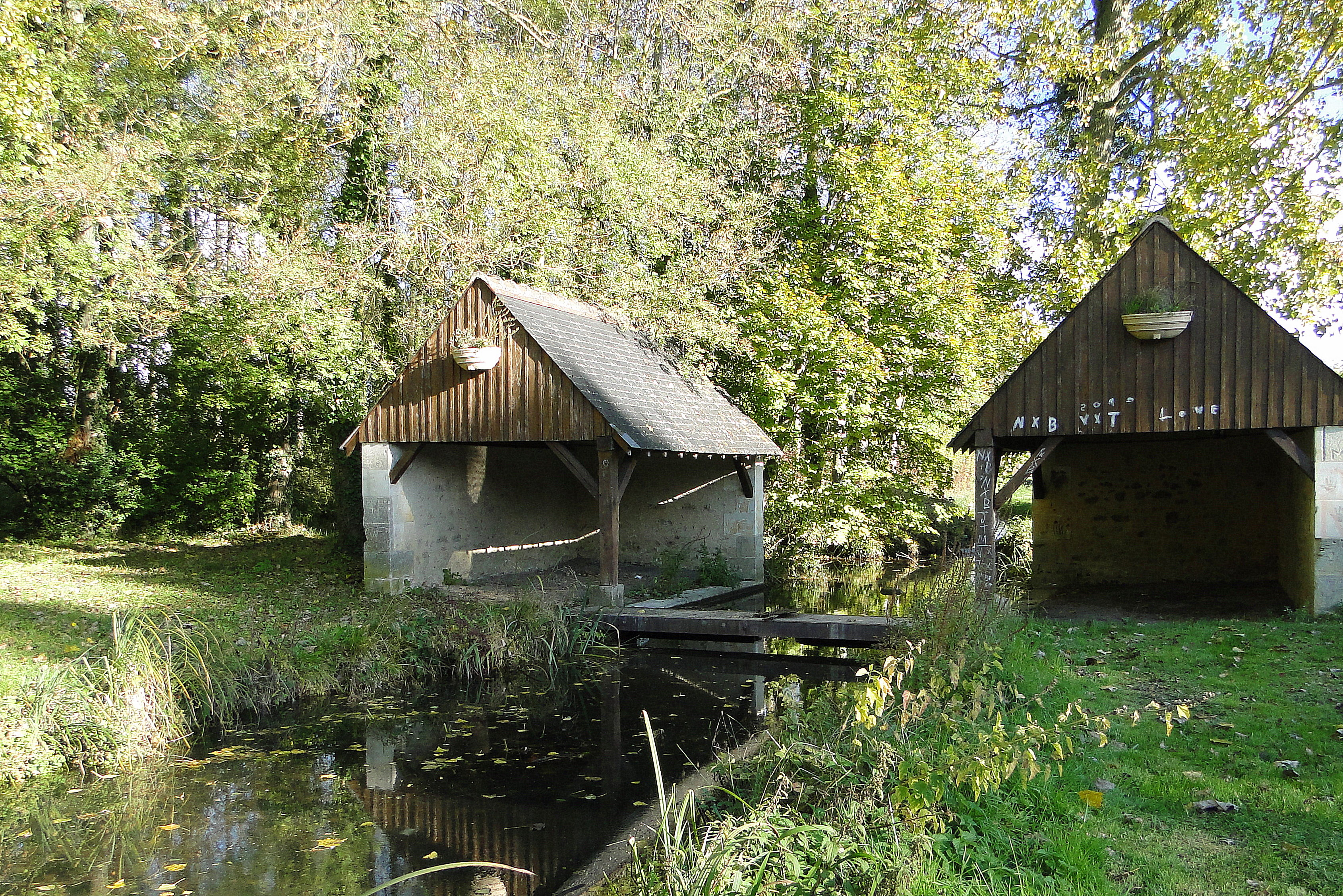 Lavoir de Chançay (Indre-et-Loire)